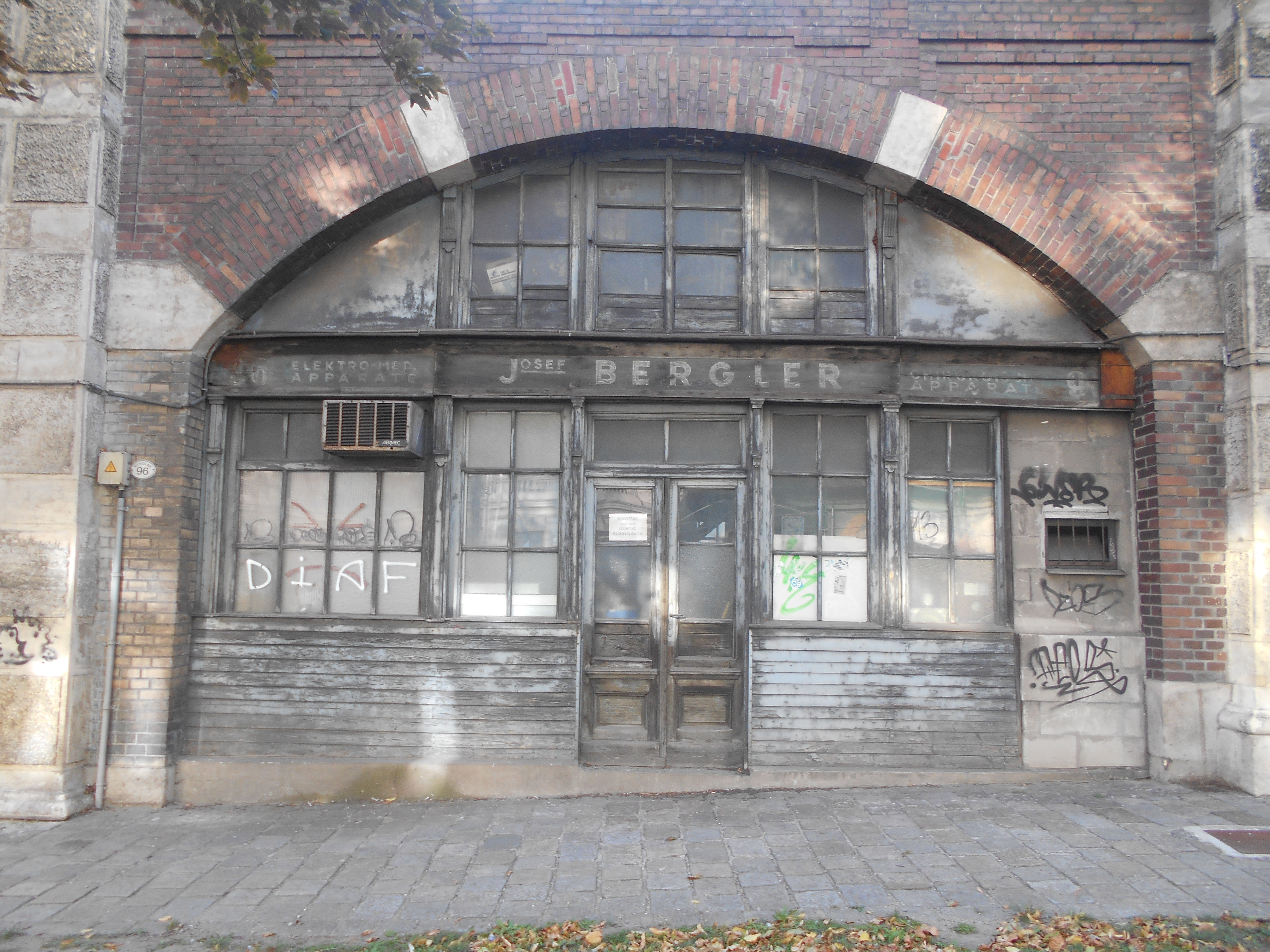 ehem. Stadtbahn – Teilbereich der heutigen U6, Gewölbe 96